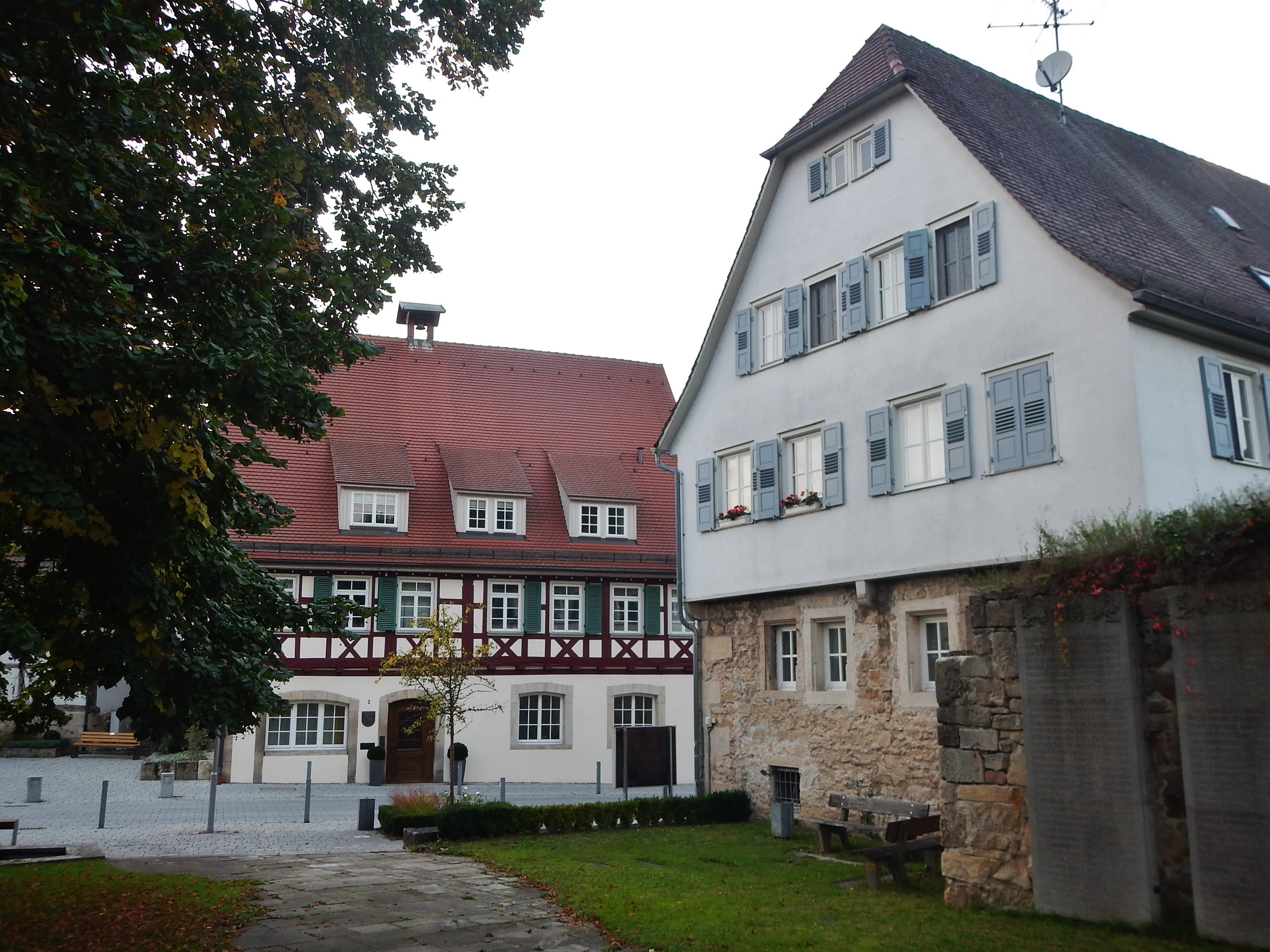 Beim 366 km langen Neckartalradweg: Neckartenzlingen mit Rathaus